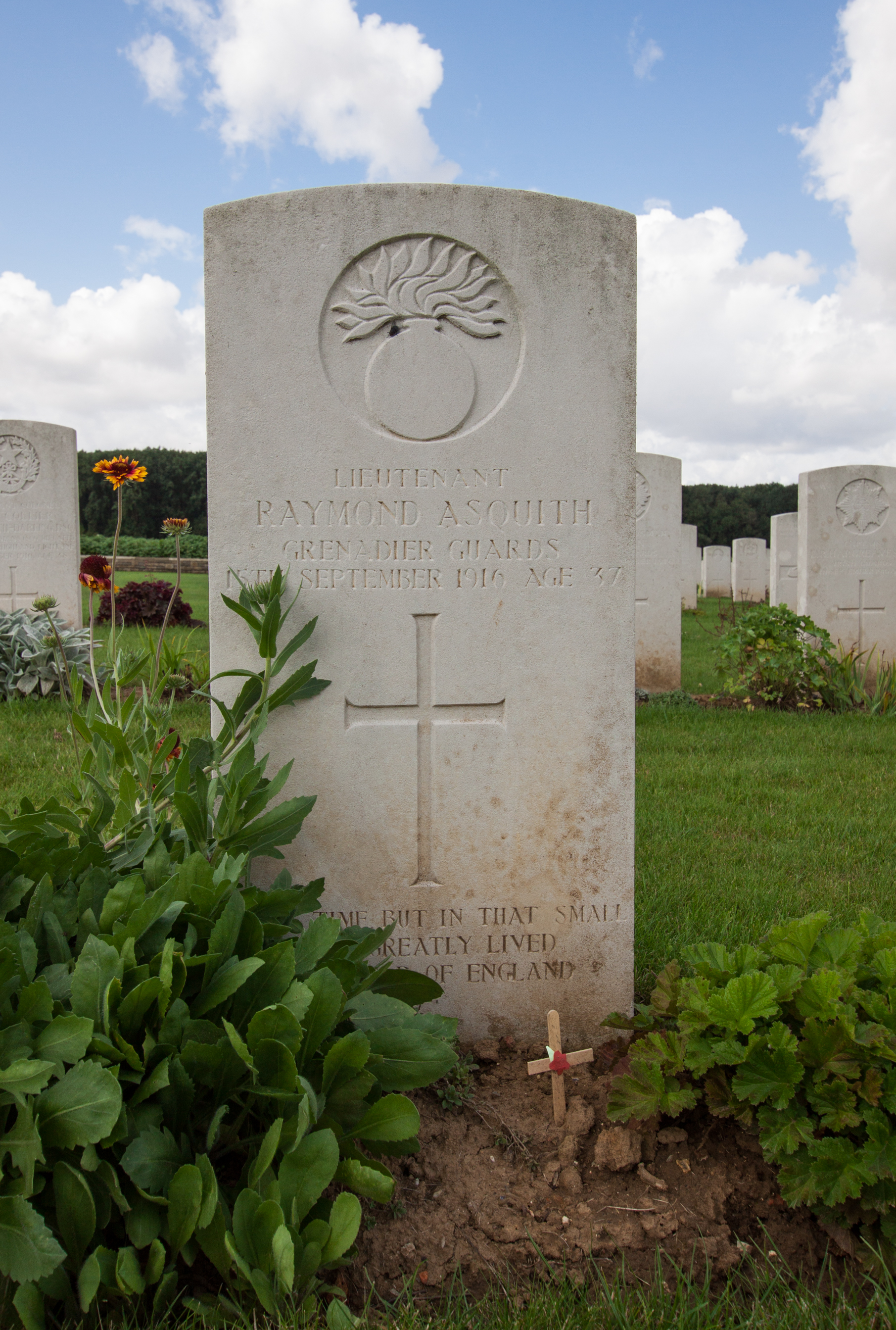 Guillemont Road Cemetery. Grave of Raymond Asquith.